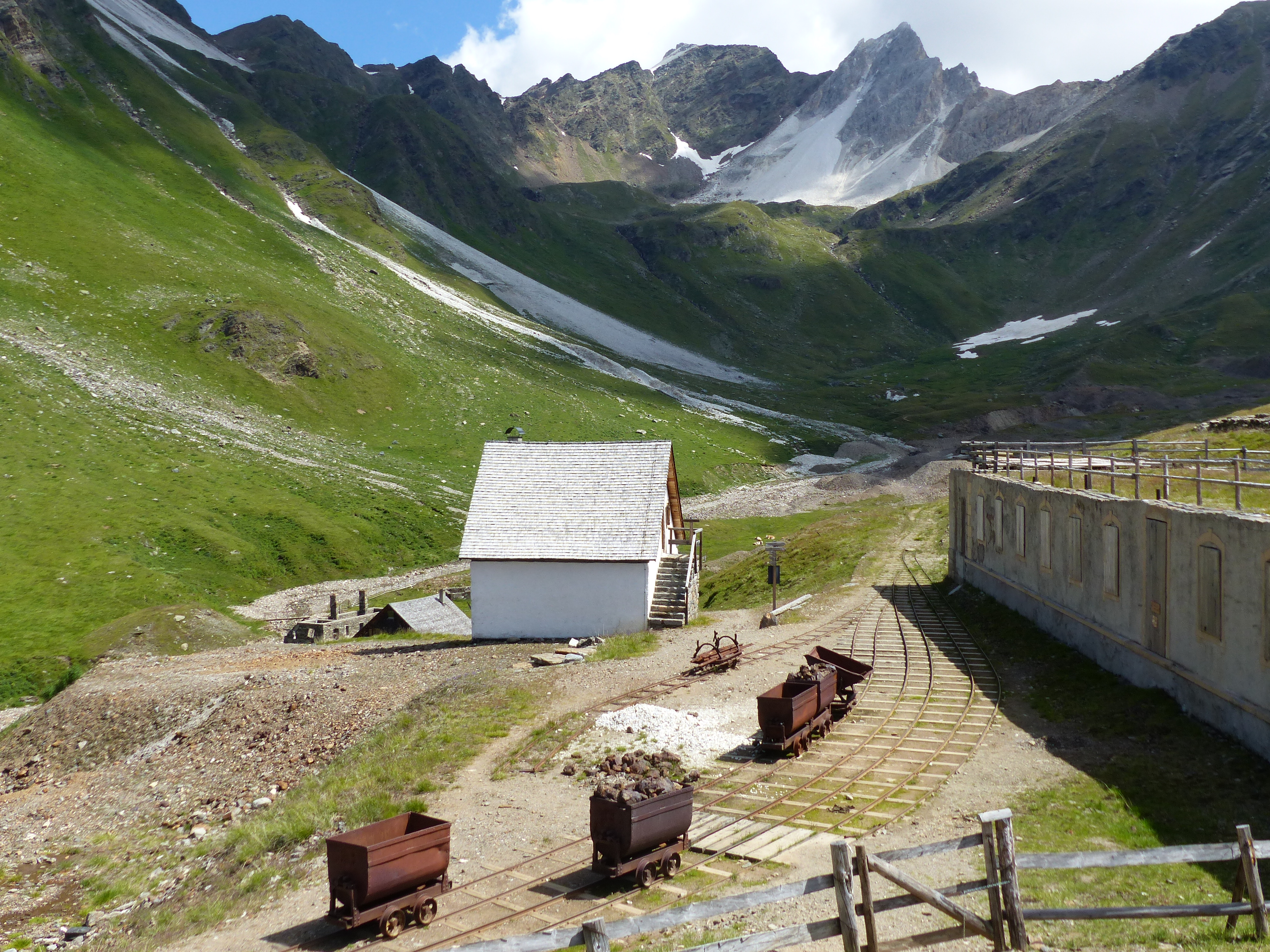 Überbleibsel und Rekonstruktionen in St. Martin (Schneeberg): Loren. Im Hintergrund: Moarer Weißen